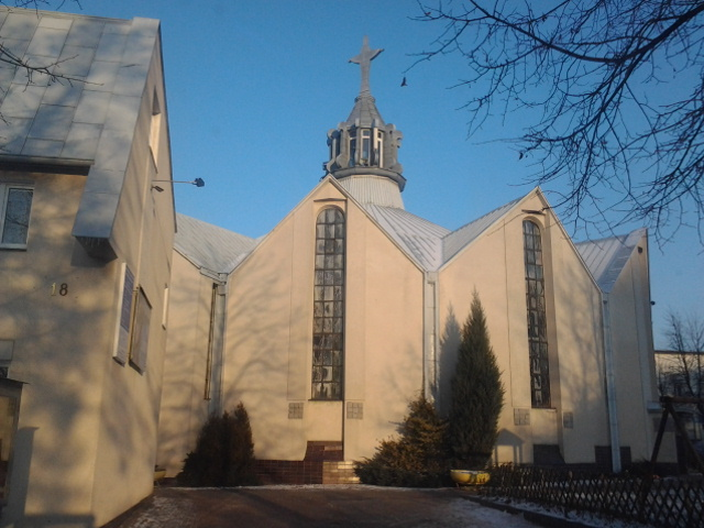 Kościół na Starym Żegrzu w Poznaniu.